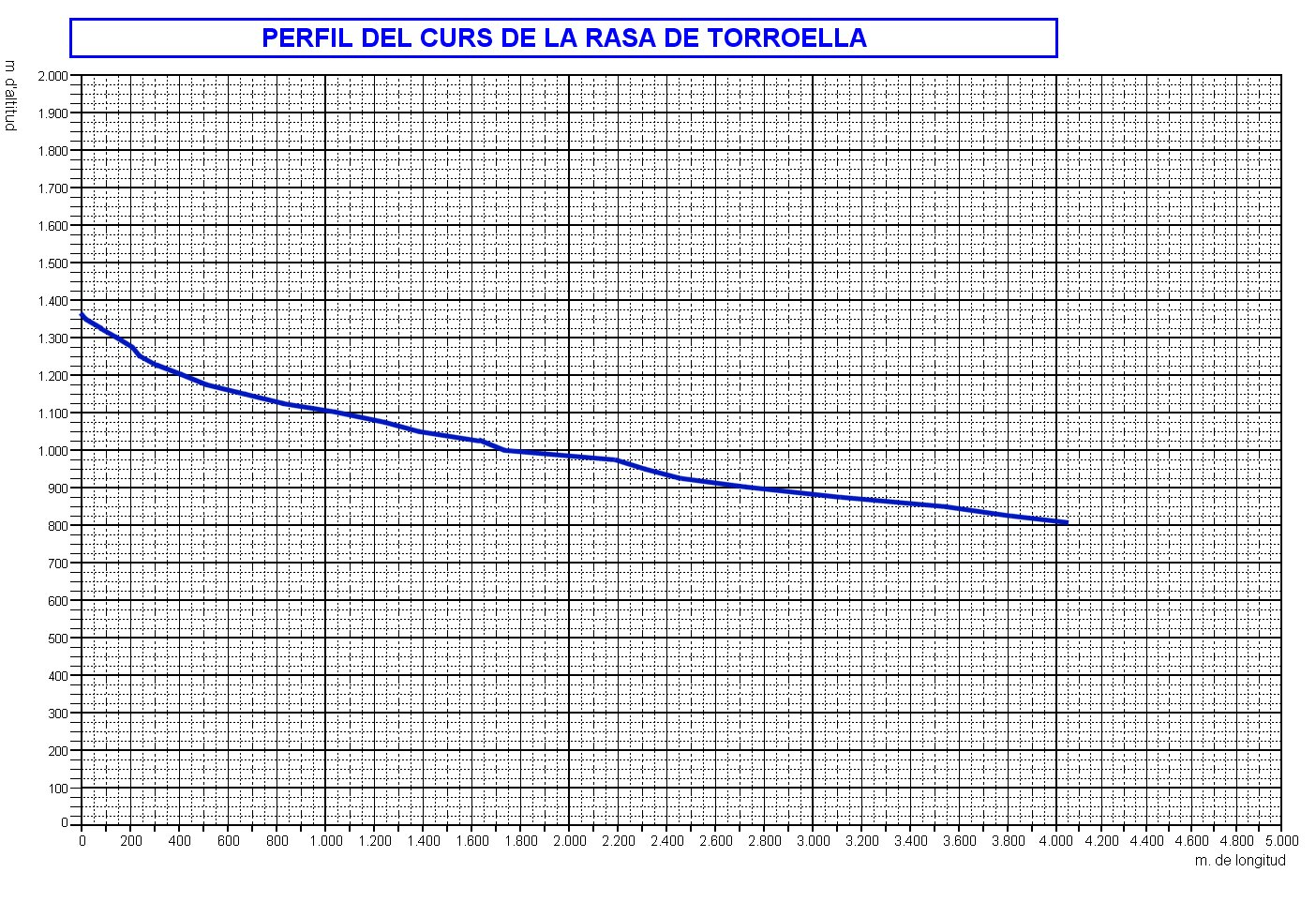 Perfil de la Rasa de Torroella (Guixers, Sant Llorenç de Morunys i Navès)